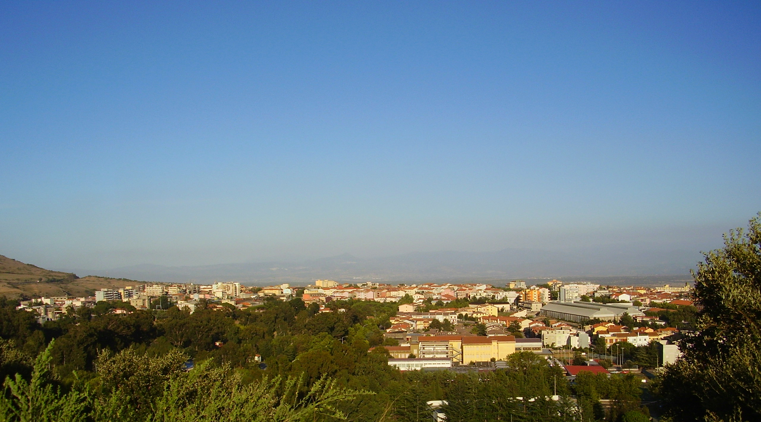 Veduta di una parte della città di Macomer